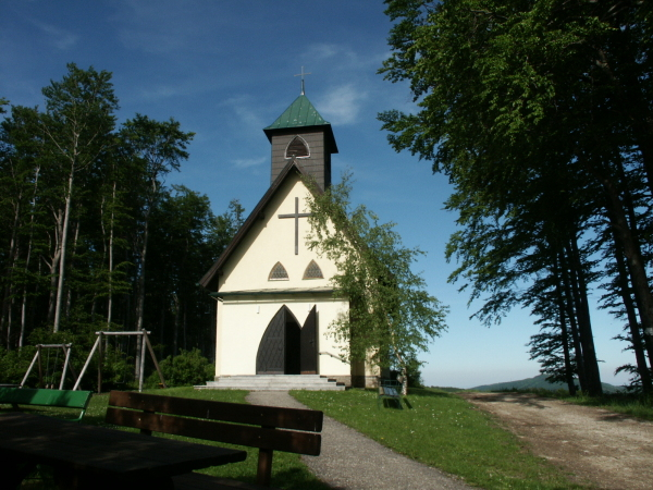 Kapelle in Scheiblingstein